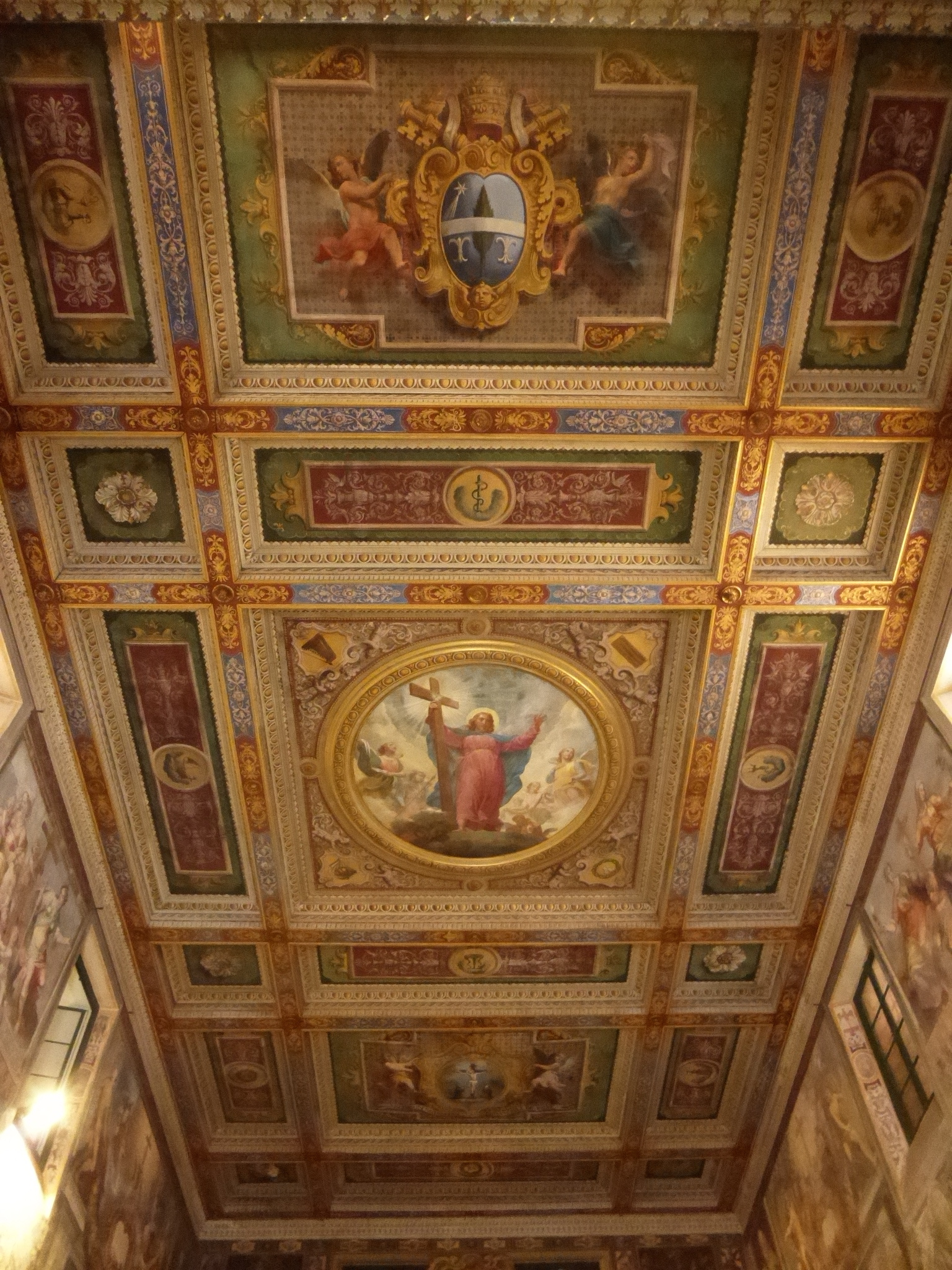 Roma, Oratorio del Crocifisso, soffitto (XIX sec.).